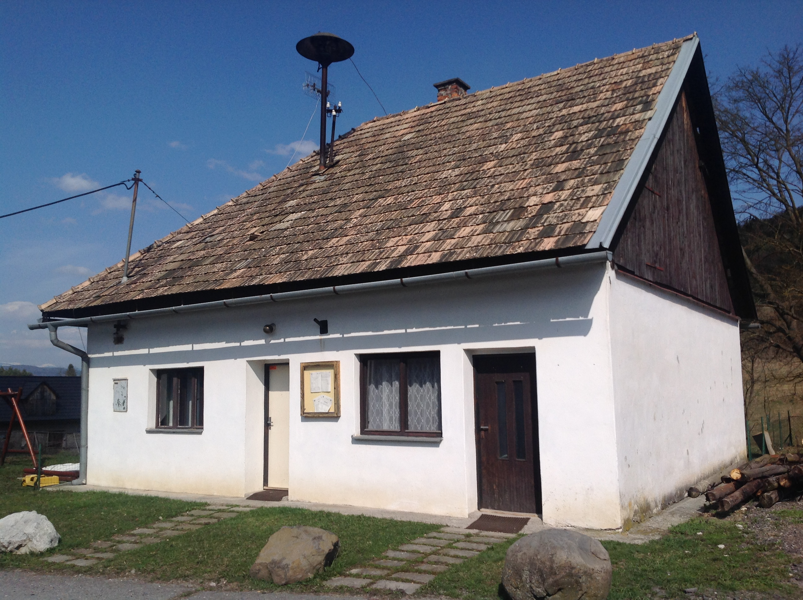 Požiarna zbrojnica v Sampore, dnes je využívaná len počas volieb ako volebná miestnosť